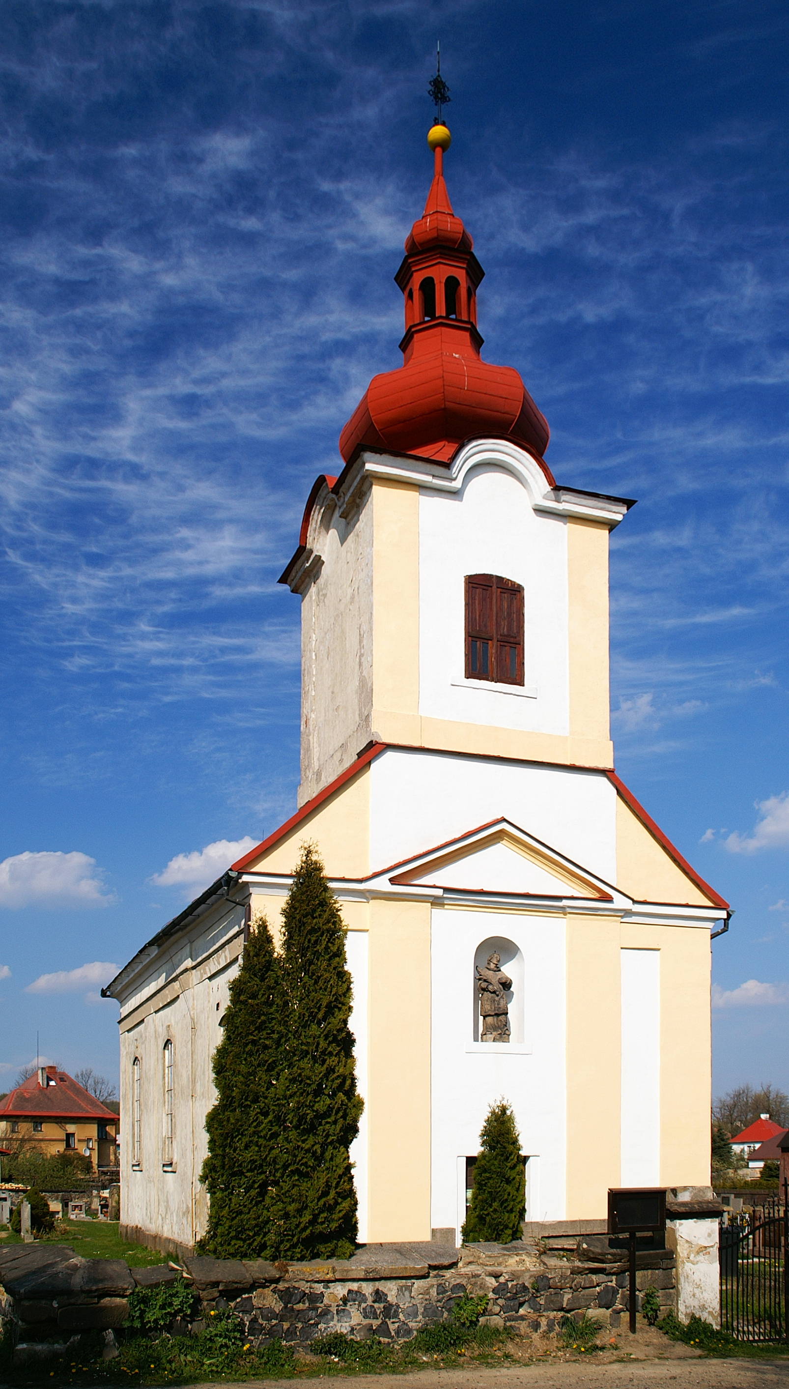 Kostel sv. Vavřince.